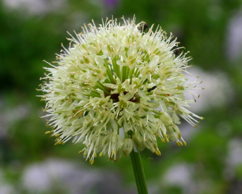 Allium victorialis